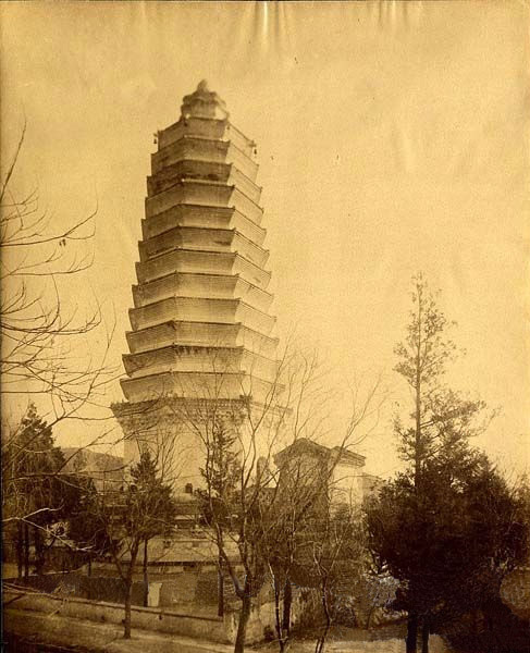 北京灵光寺招仙塔